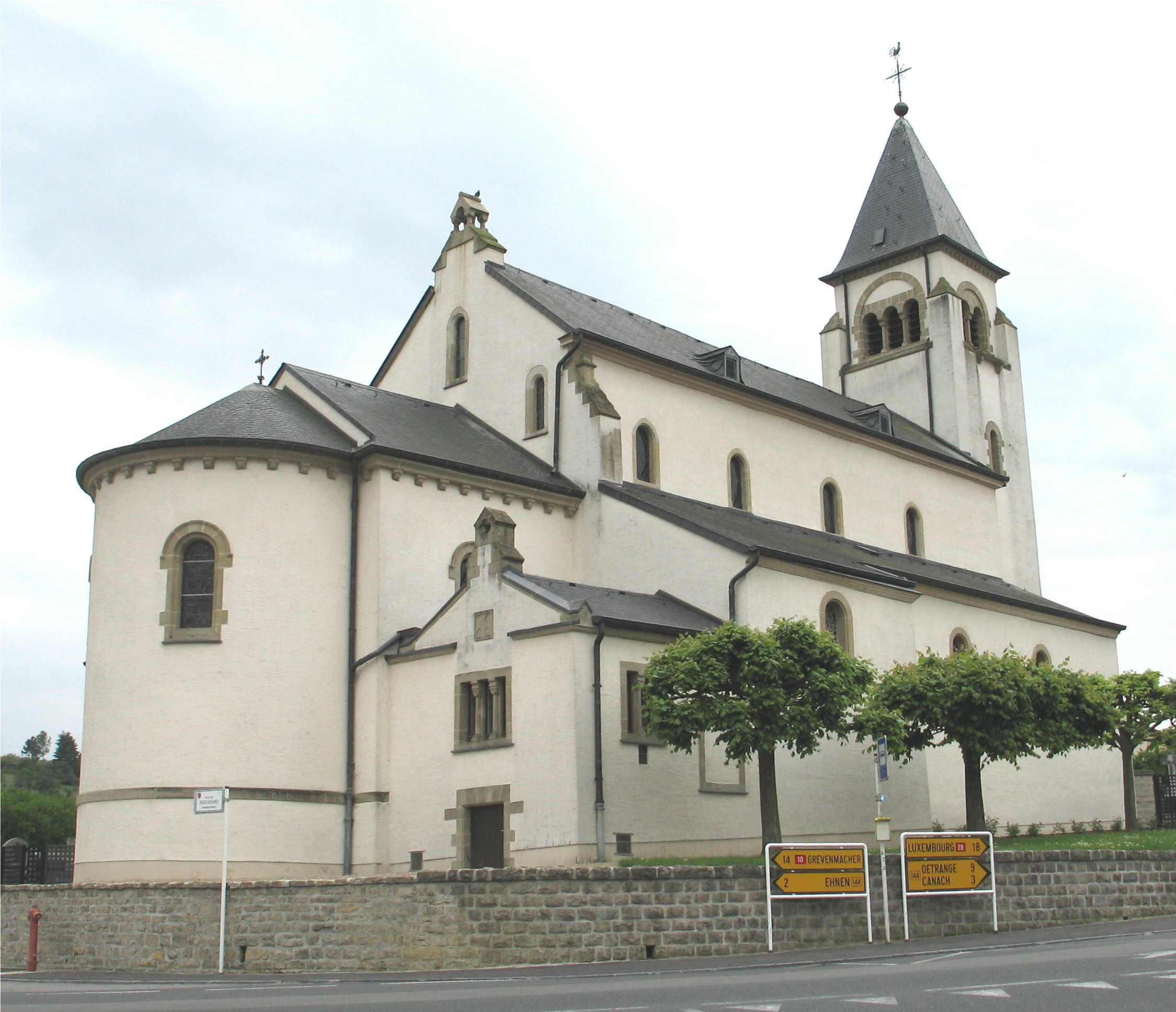 La basilique de Lenningen (Luxembourg)